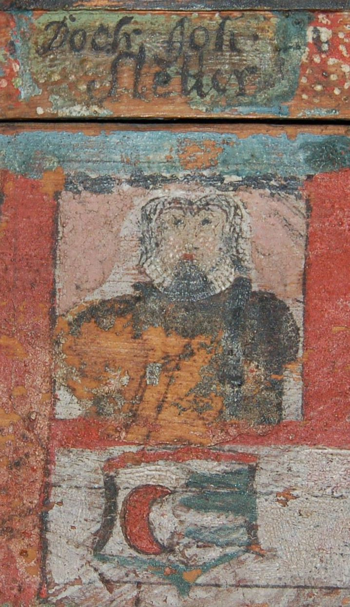 Biskop Schletter malt av presten Sigvard Kildal, nå i Tromsø museum